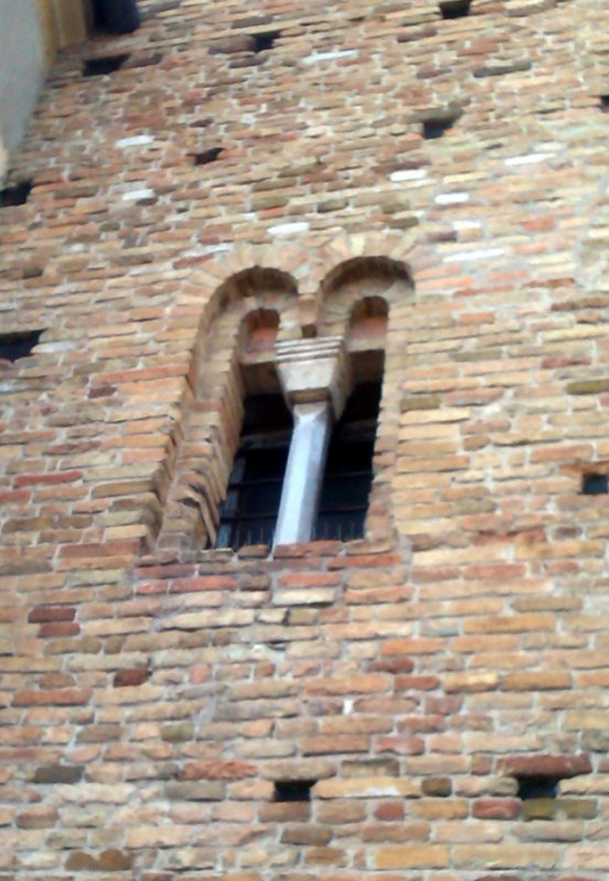 Bifora sul campanile della chiesa di Ognissanti a Padova.